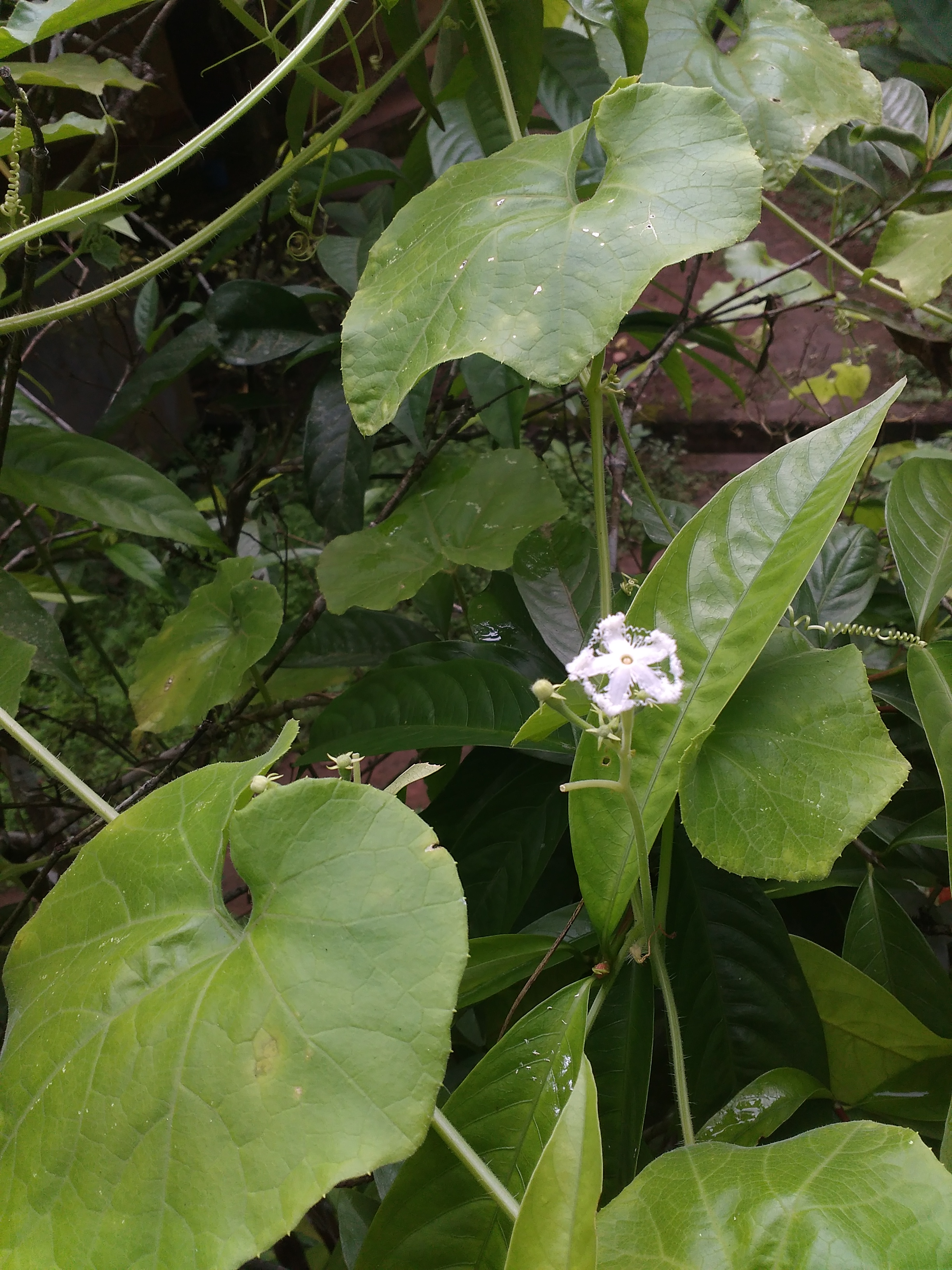 kattu padavala (Trichosanthes dioica) leaf and flower. photo Taken from Vellakkat mana